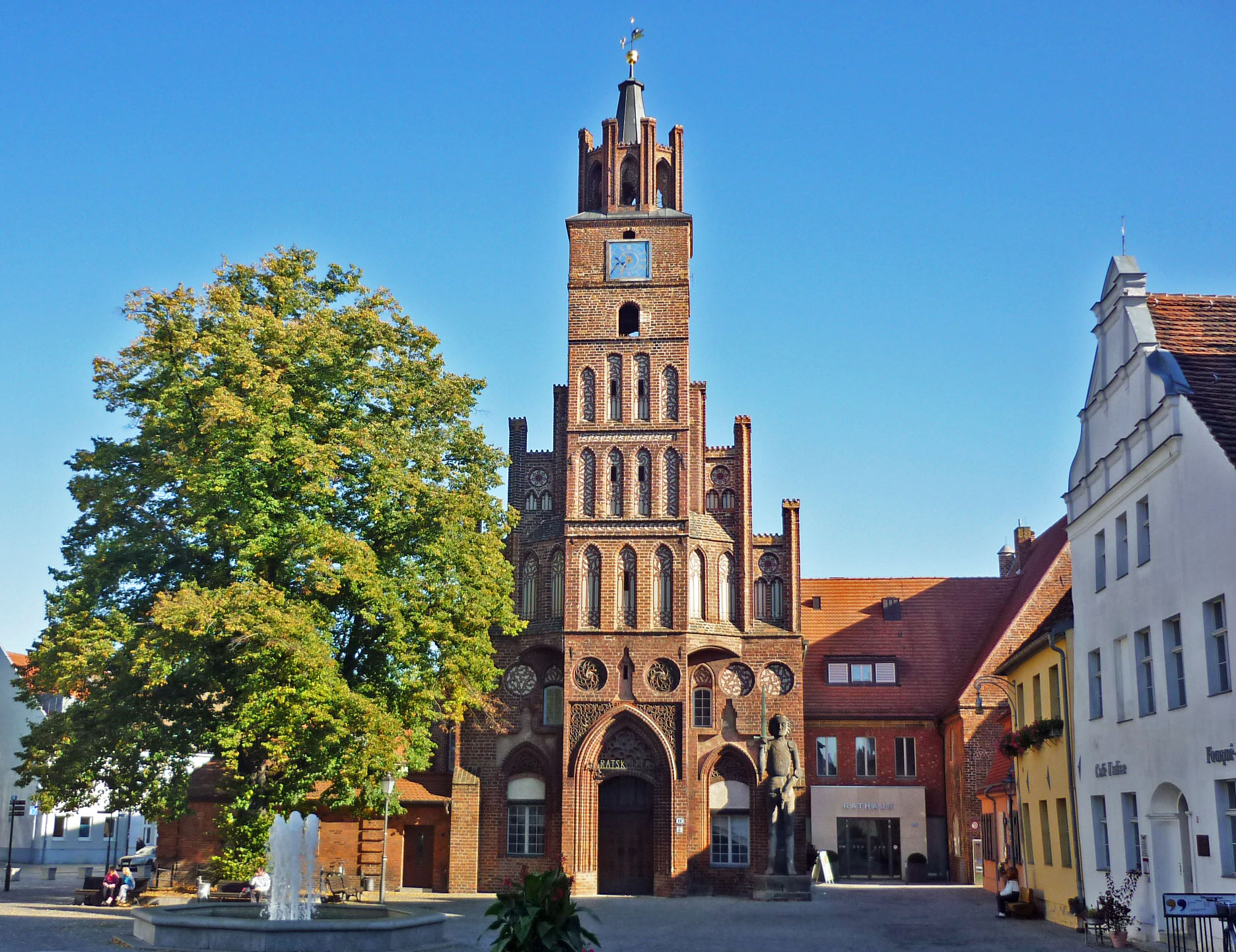 Brandenburg (Havel), Altstädter Rathaus mit Roland